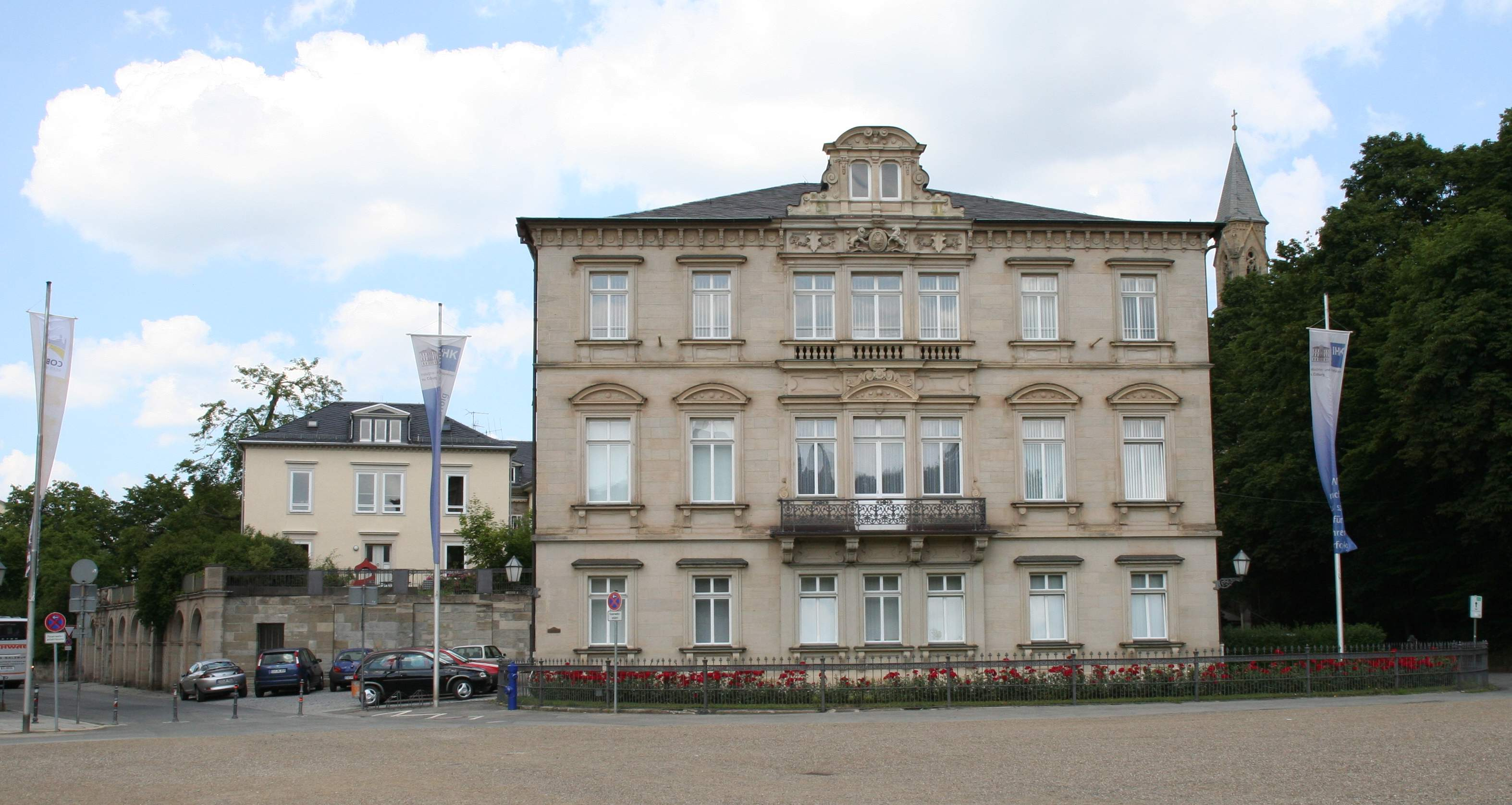 Edinburgh-Palais in Coburgam Schlossplatz